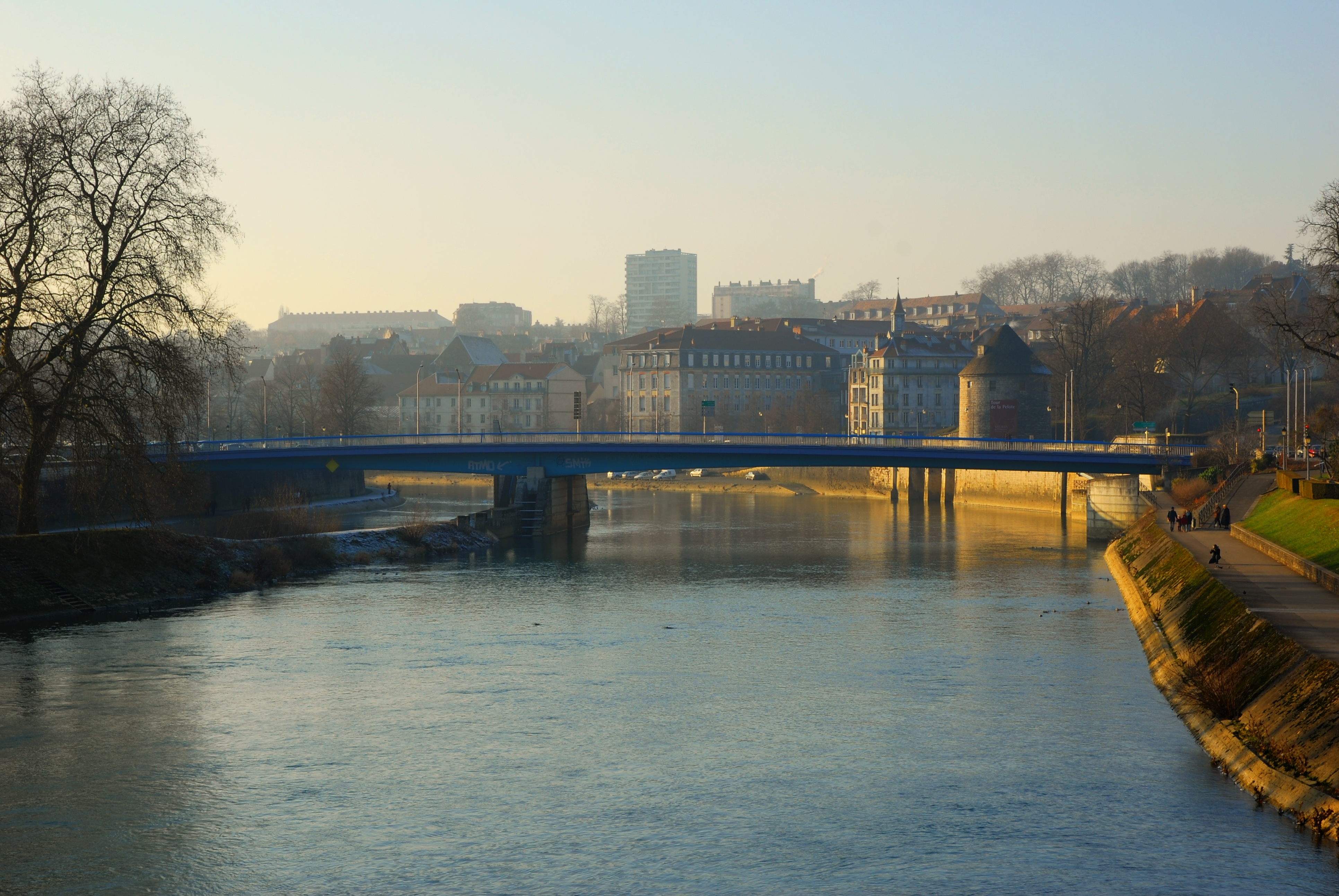 HDR réalisée avec 5 images ainsi que le logiciel photomatix.